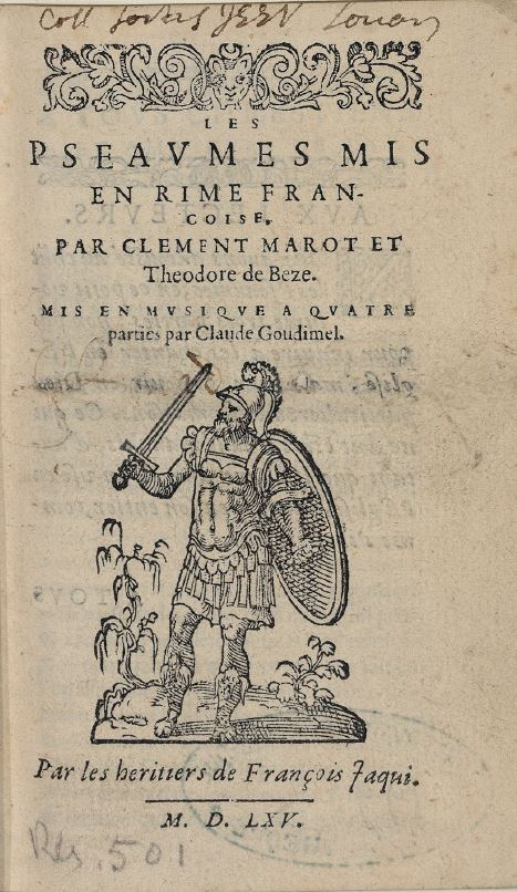 Title page of Goudimel homophonic psalms (Genève : Jaquy, 1565).